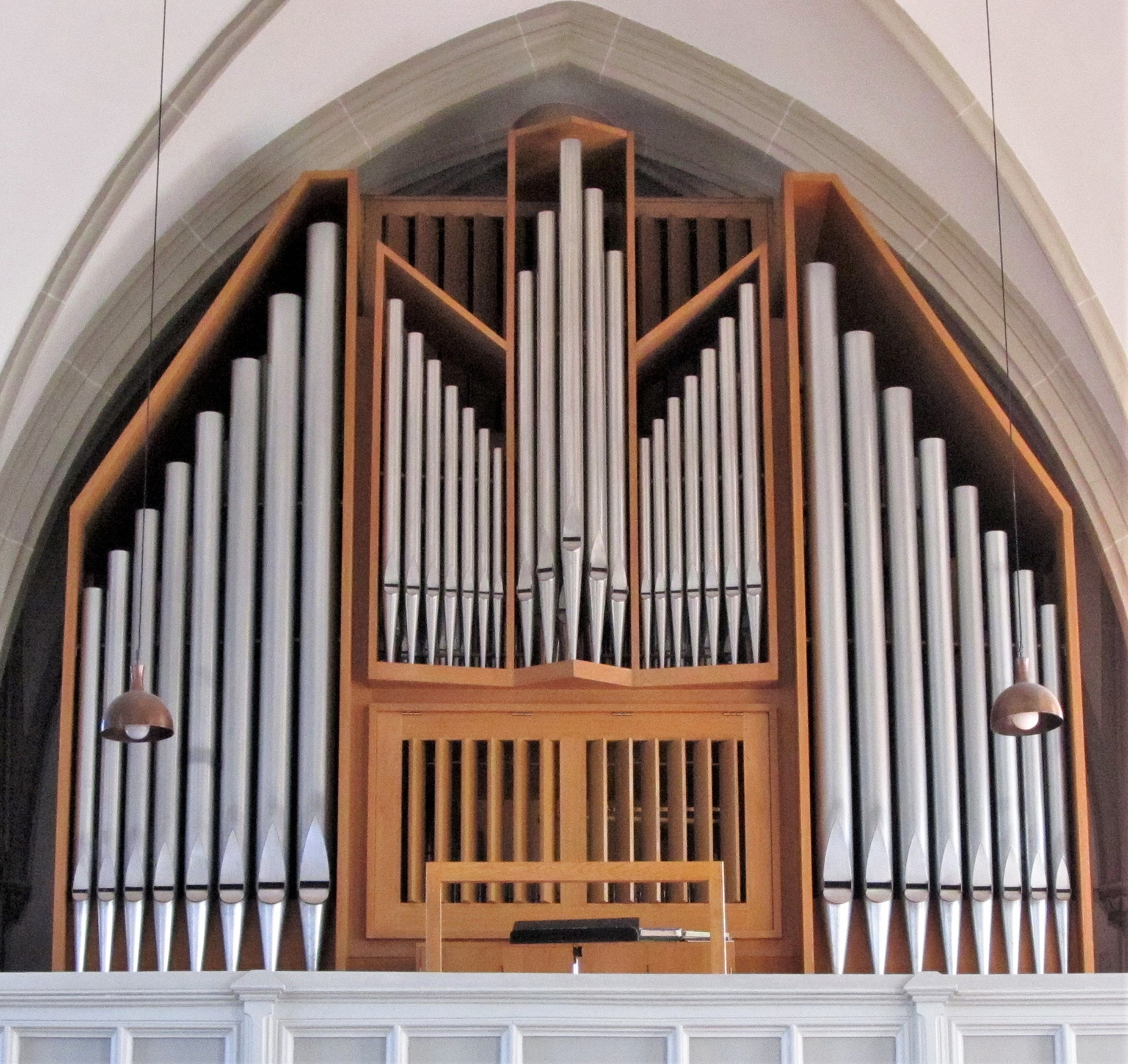 Orgelprospekt der prot. Stadtkirche in Homburg, Saarland